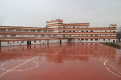 Estremeñu: Salesianos de Carabanchel